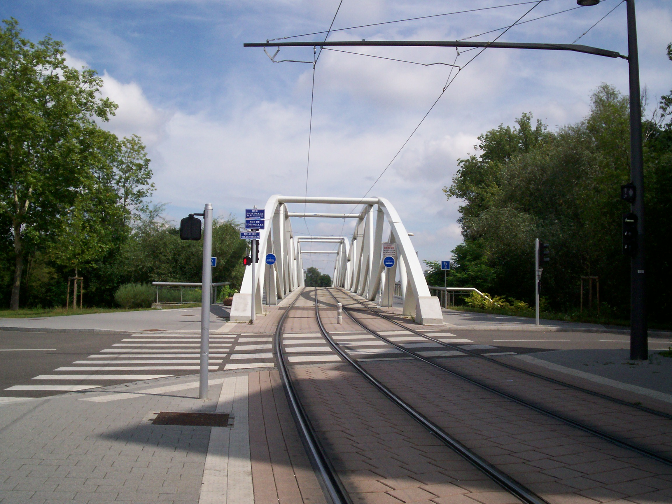 Pont à proximité directe d'Elmerforst